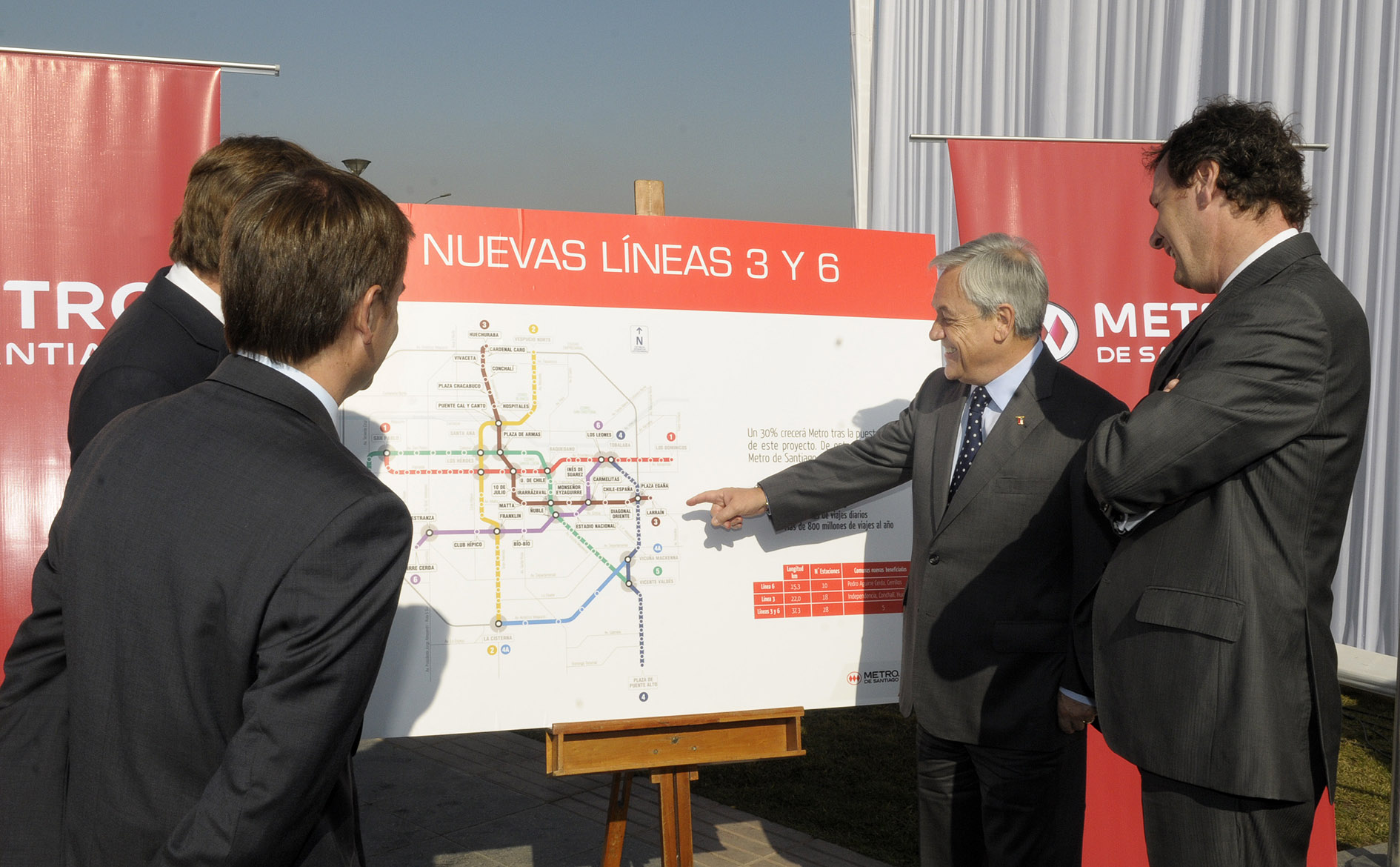 Año 2011